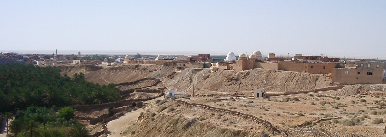 Panoràmica de Nefta